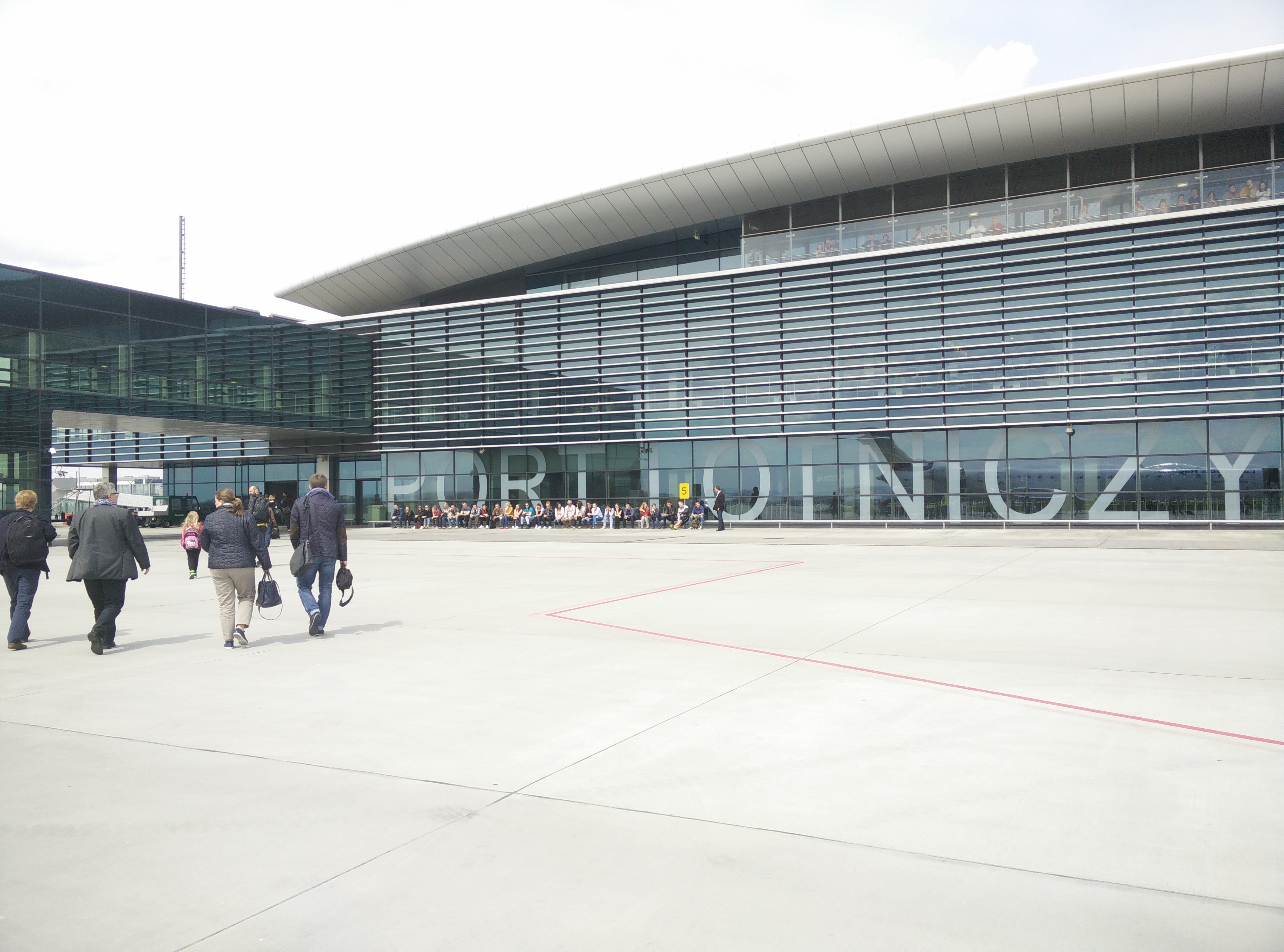 Rzeszów-Jasionka Airport Building